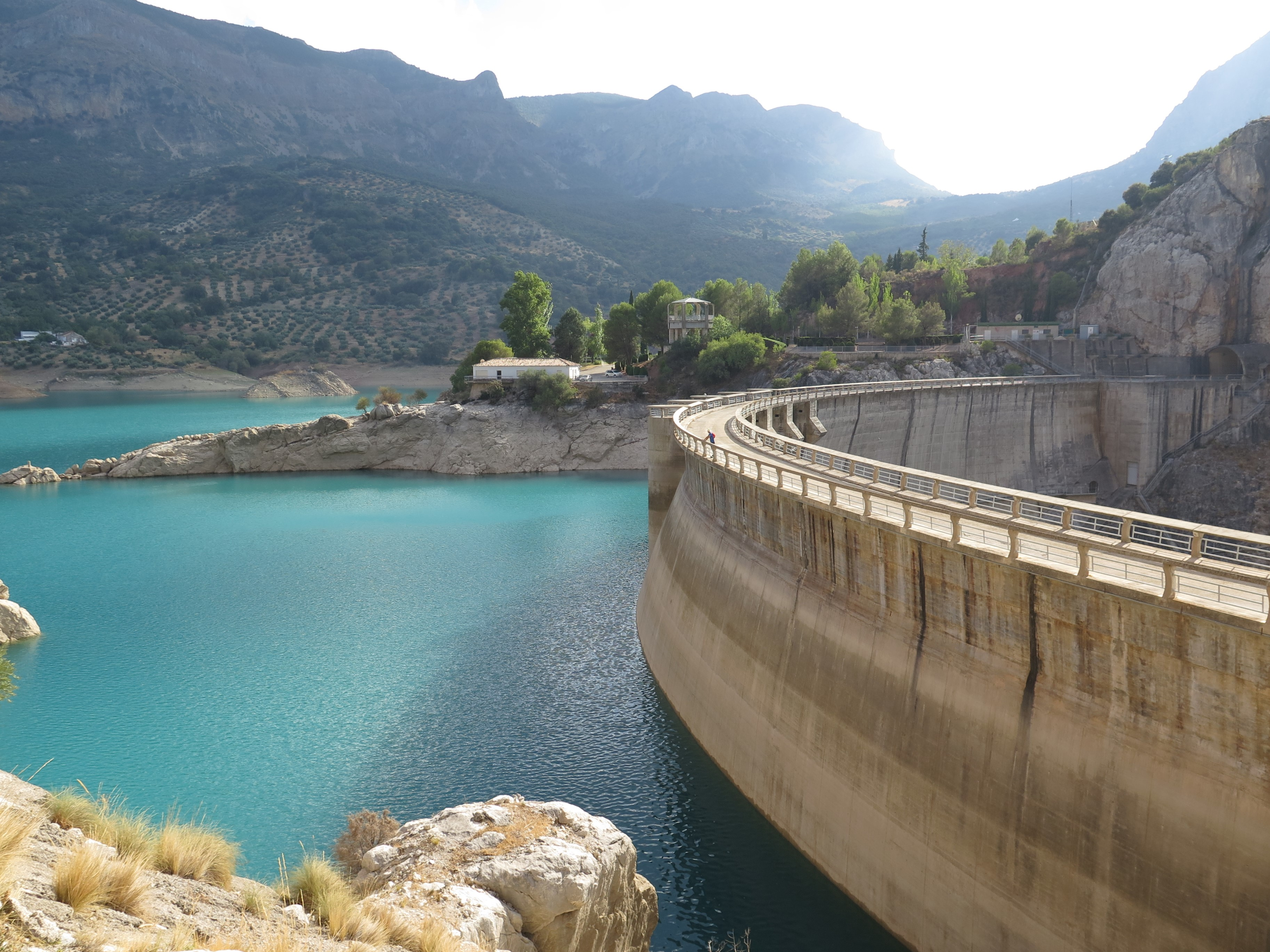 Vista del pantano del Quiebrajano desde el lado contrario a la carretera.